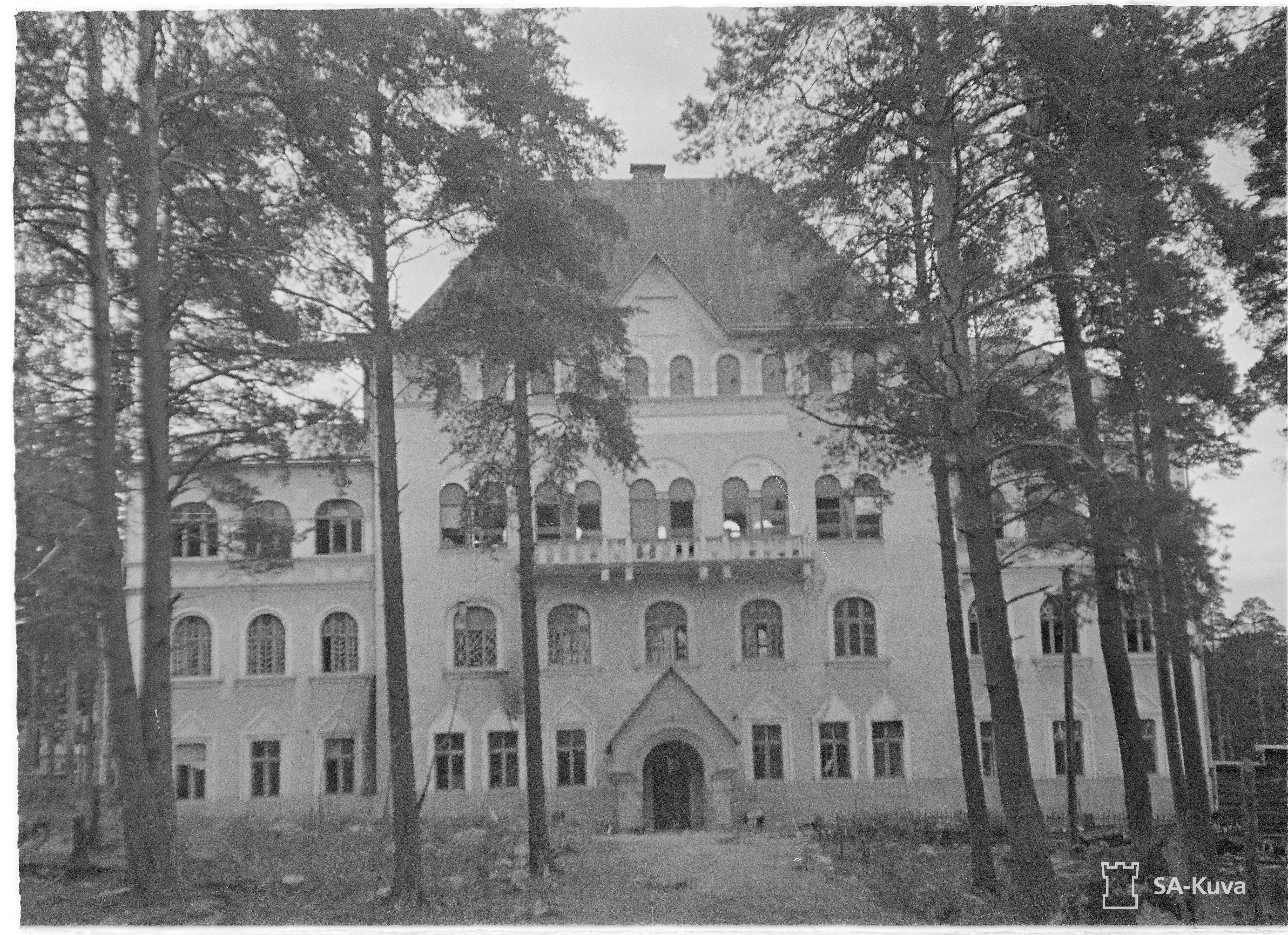 Марковилла